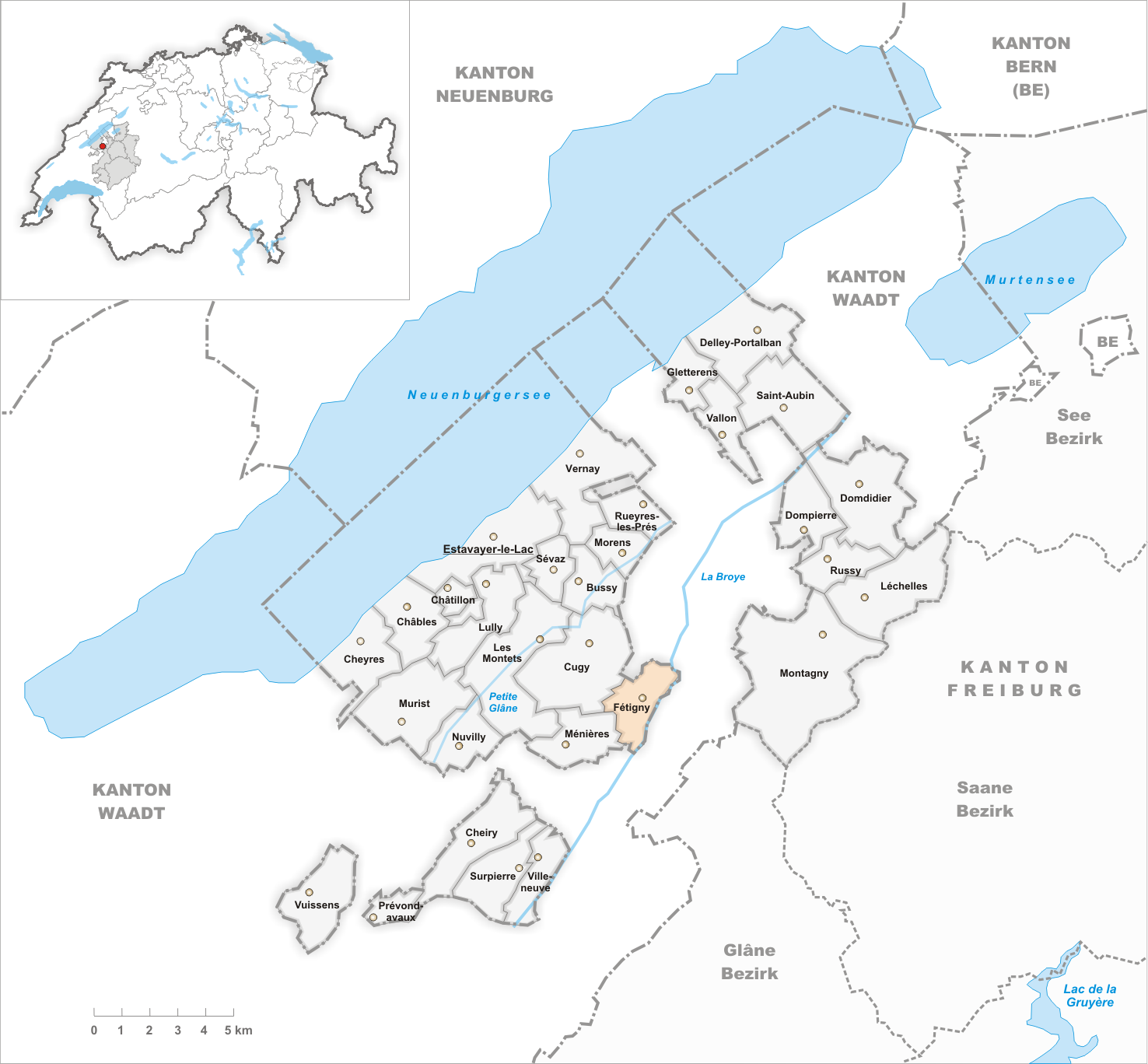 Municipality Fétigny